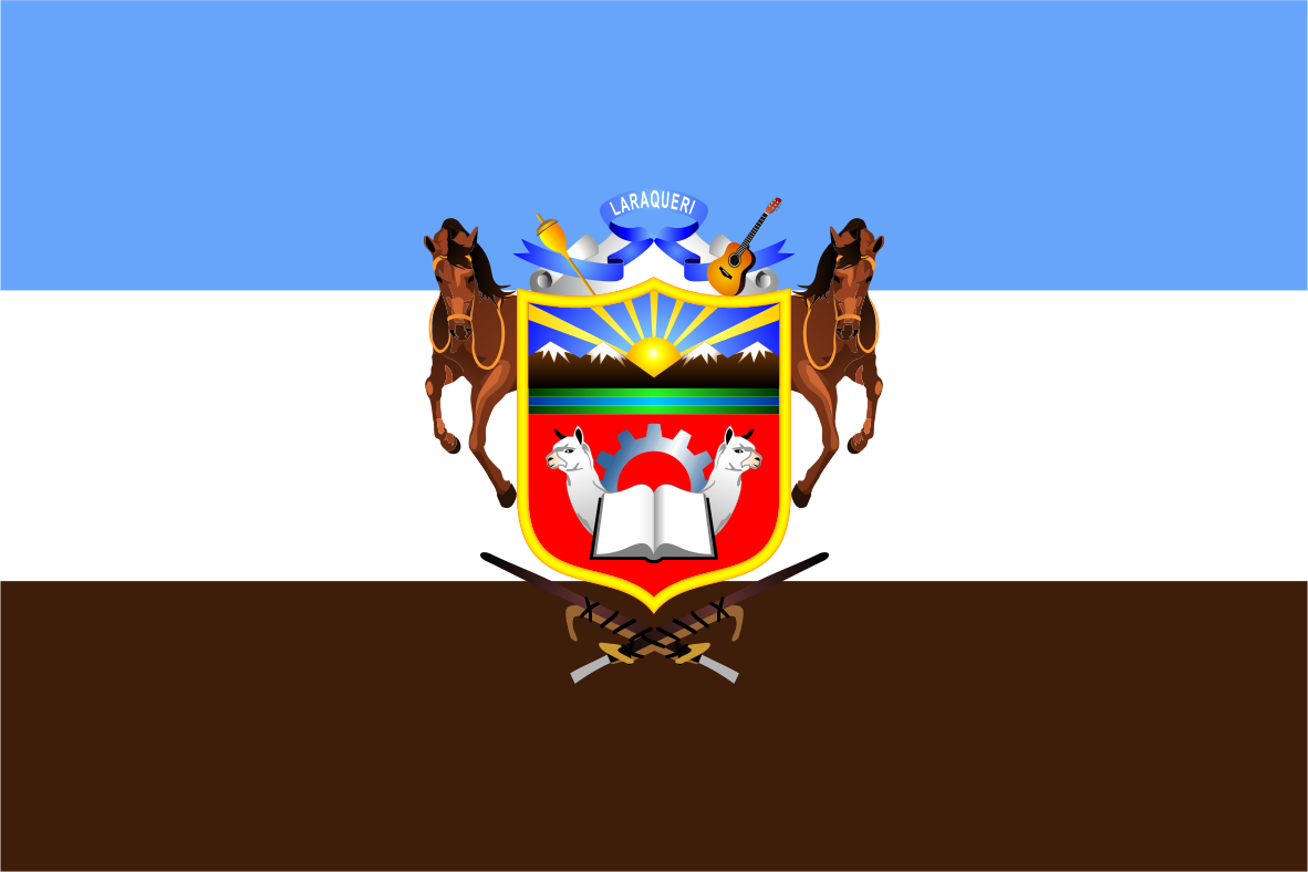 Distrito de Pichacani - Provincia de Puno - Región puno